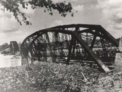 สะพานจุลจอมเกล้าหลังจากทหารฝ่ายสัมพันธมิตรทิ้งระเบิด